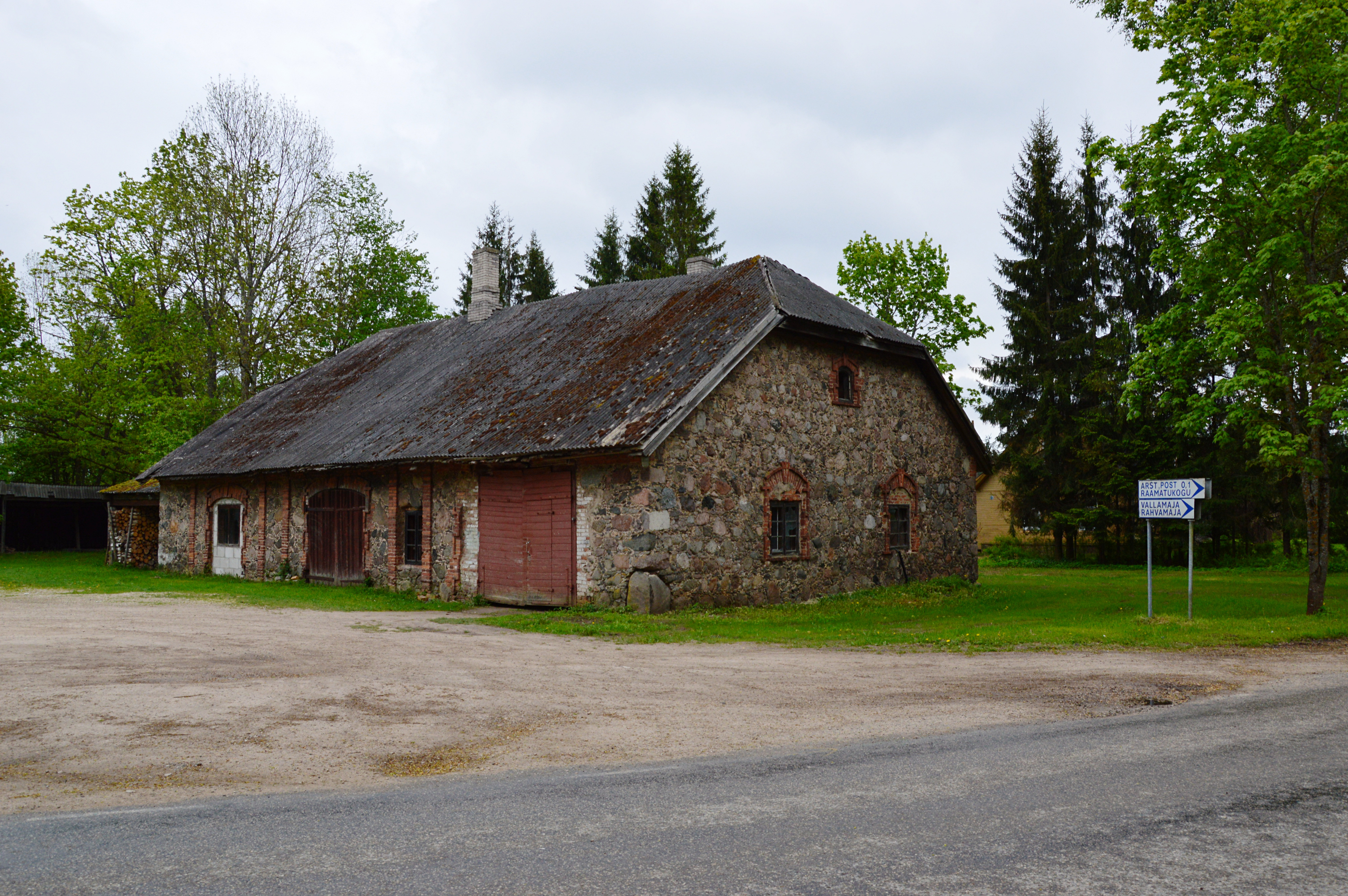 Orava mõisa tõllakuur.